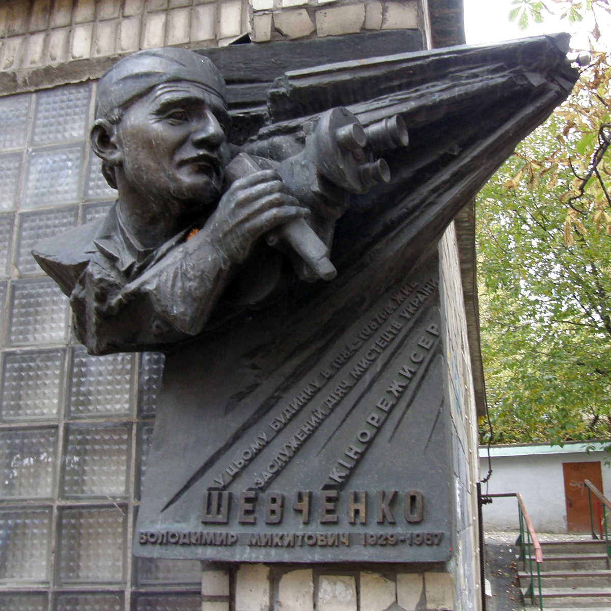 мемориальная табличка Владимира Шевченко на ул. Неманской, 7